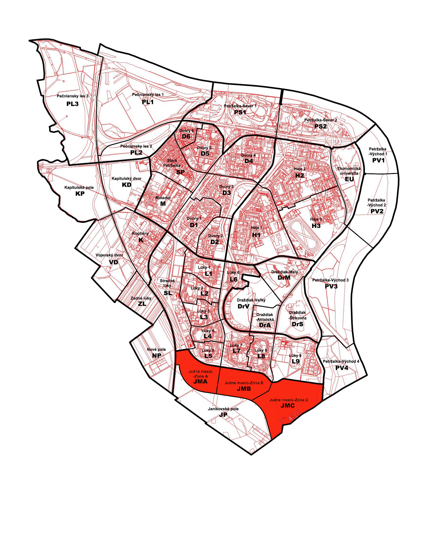 Poloha miestnej časti Petržalky